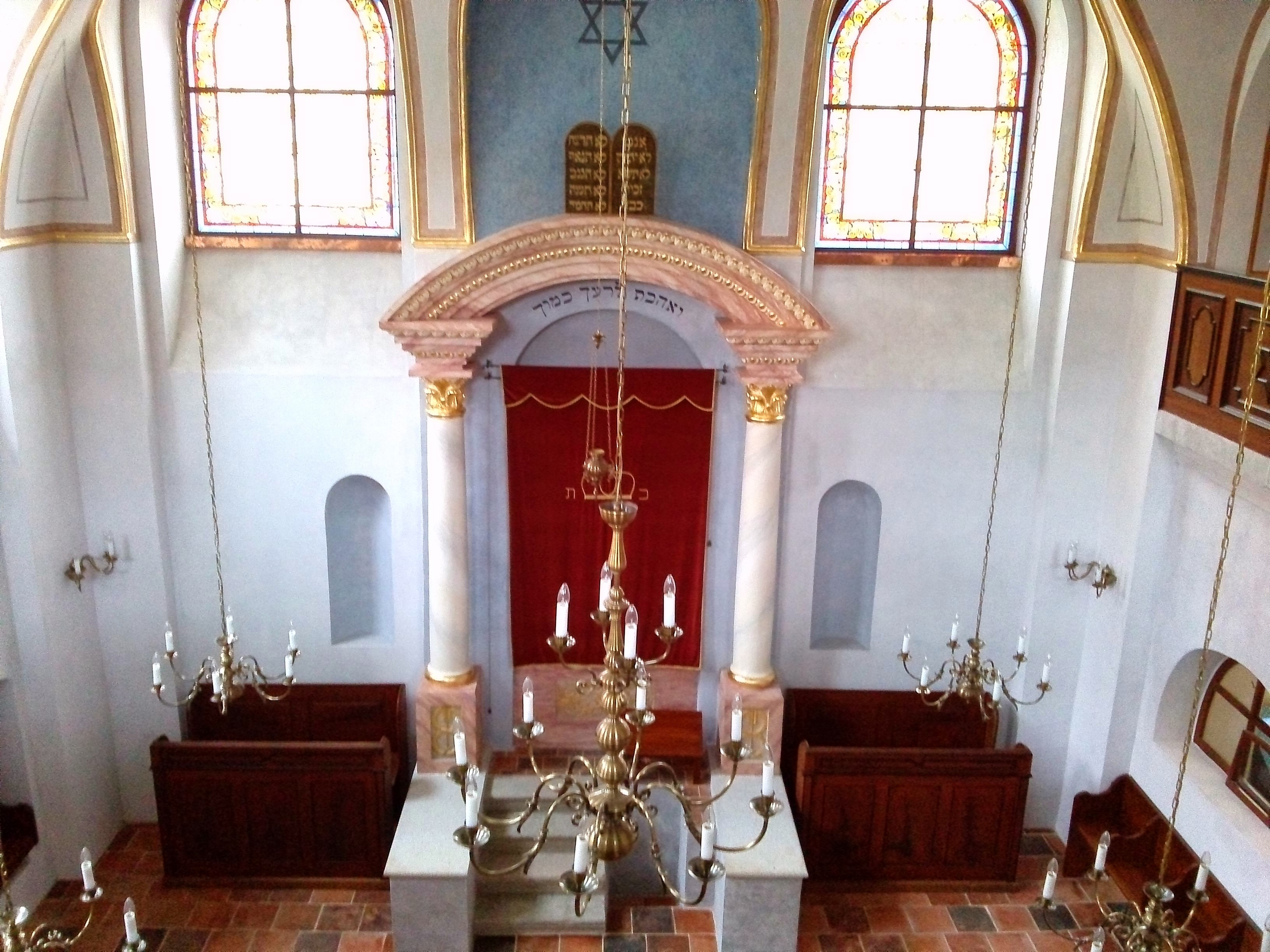 Pohled na svatostánek